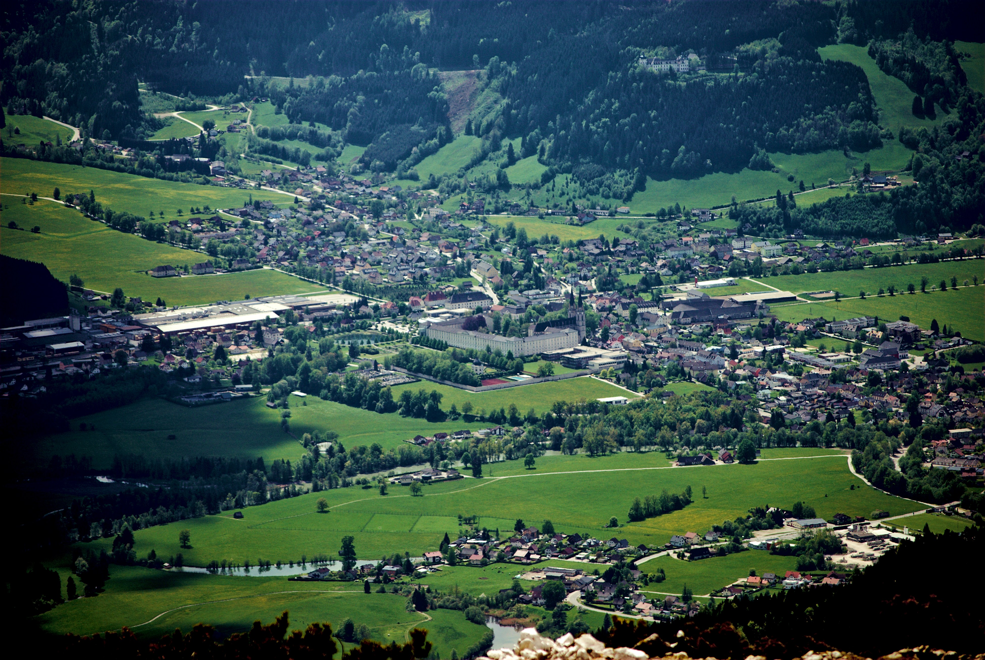 Die Marktgemeinde Admont vom Grabnerstein aus gesehen.